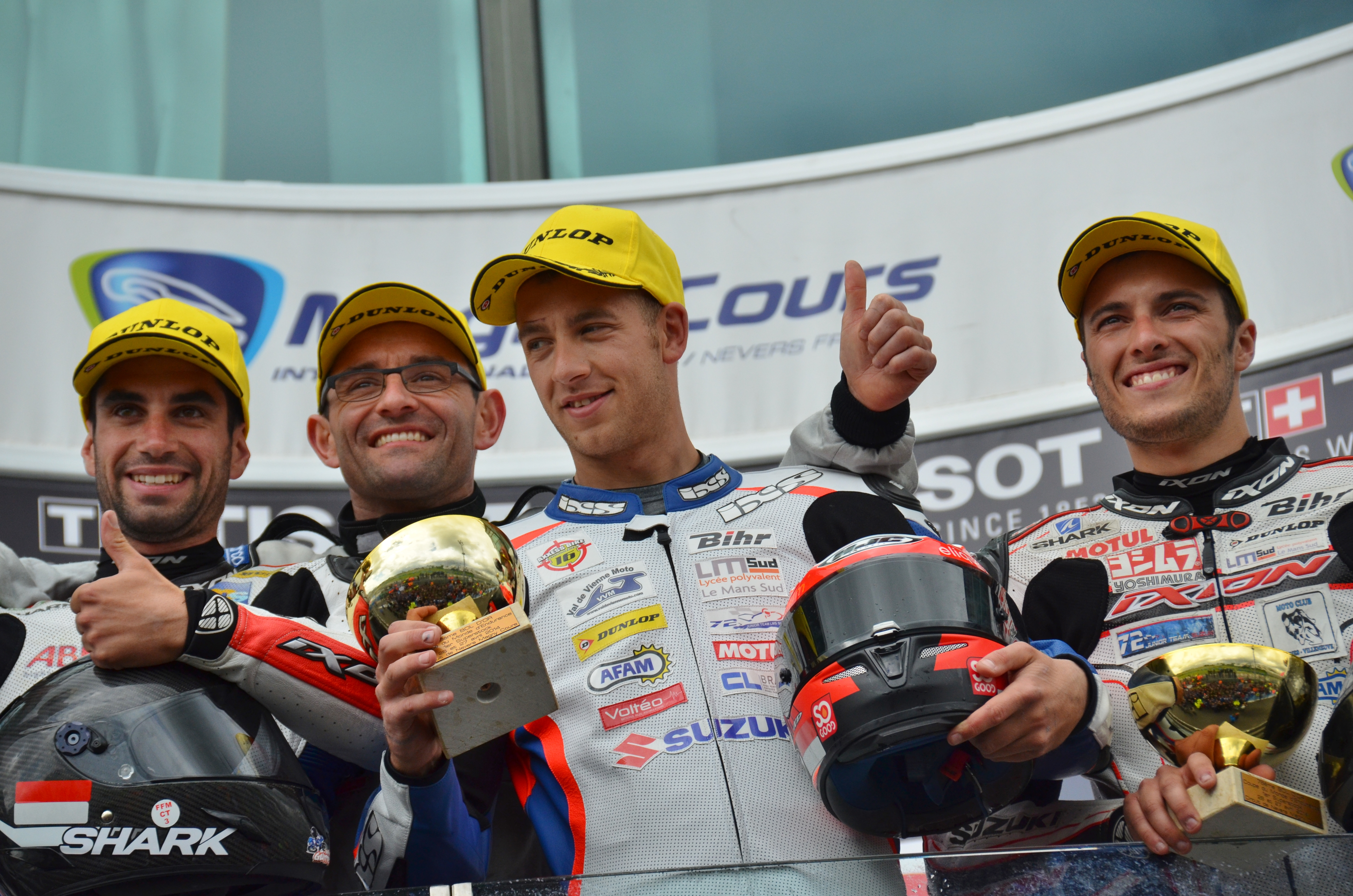 Etienne Masson lors du Bol d'Or 2014